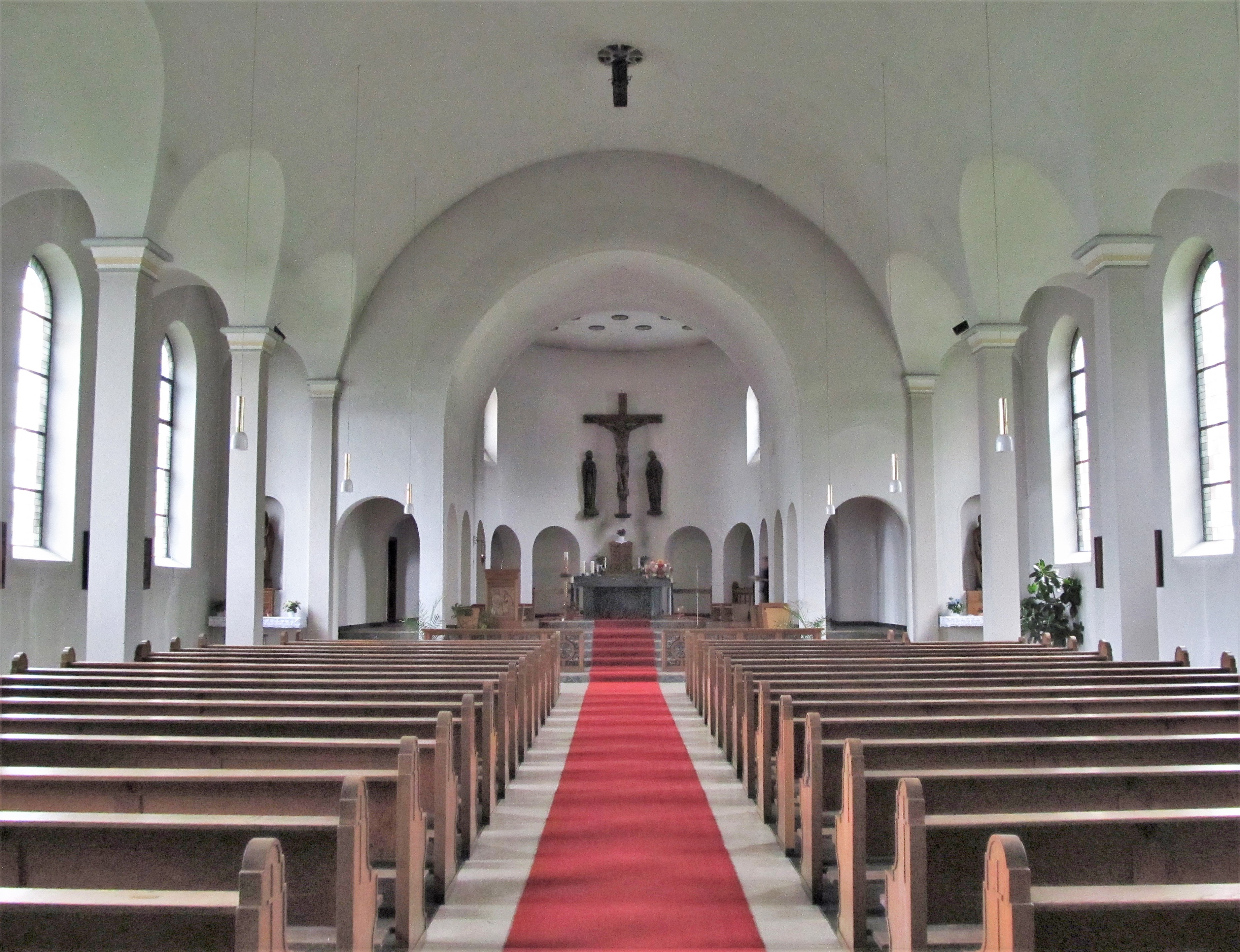 Blick ins Innere der katholischen Pfarrkirche St. Laurentius in Eschringen, einem Stadtteil der saarländischen Landeshauptstadt Saarbrücken